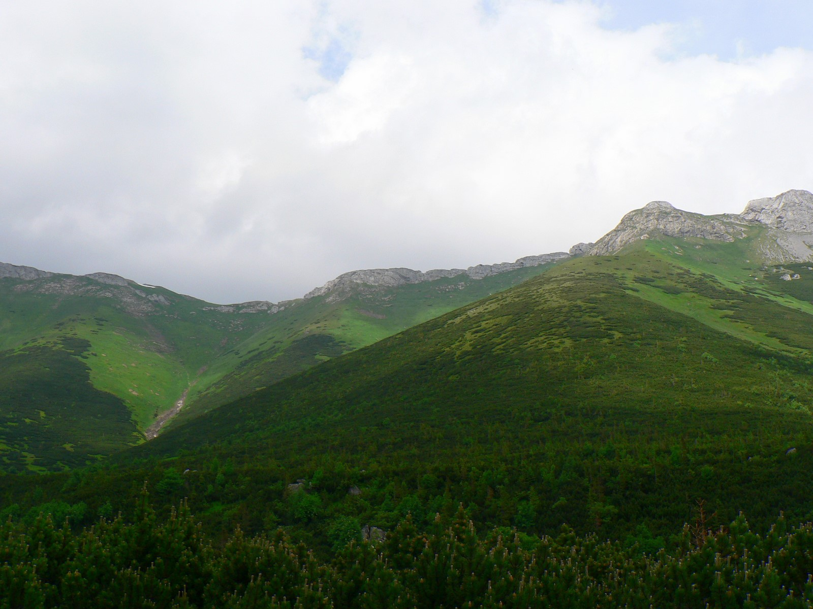 Pośrednie Jatki ze szlaku Doliną Kieżmarską